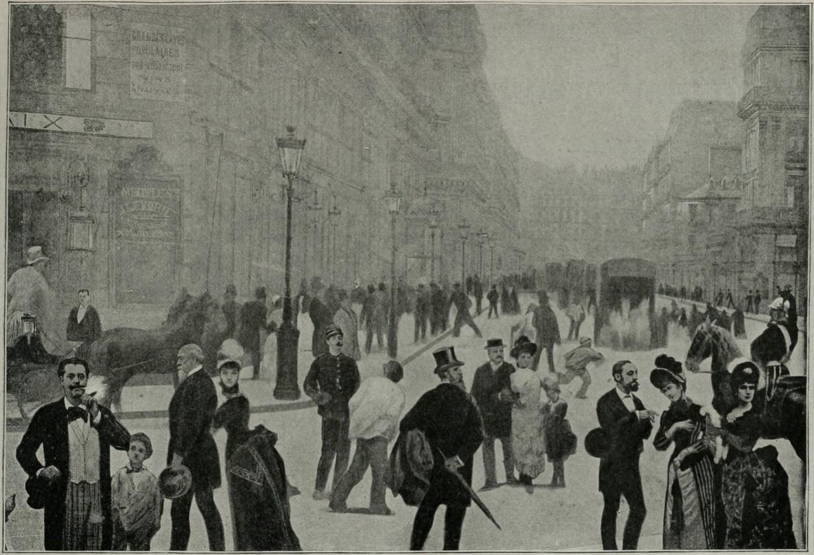 Planche du livret explicatif du panorama le "Tout-Paris" peint par Charles Castellani et présenté lors de l'exposition universelle de 1889.